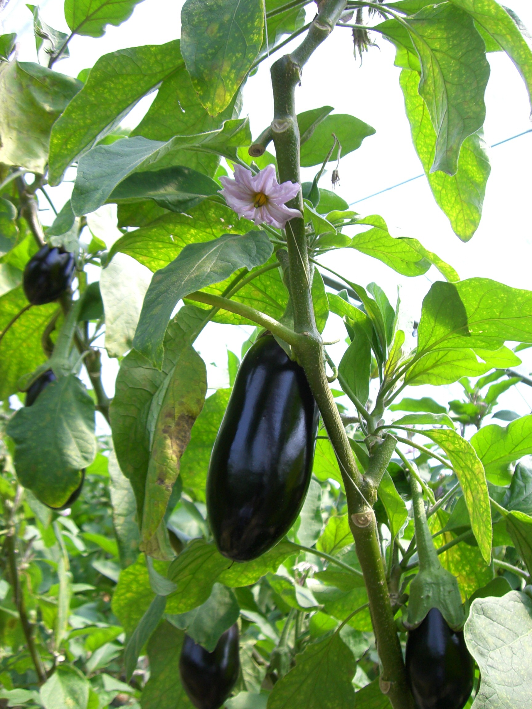 Eggplant ナスの花と実